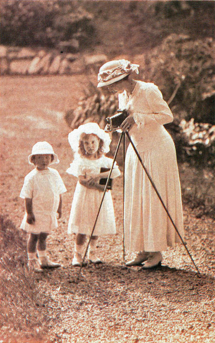 Prinsessan Margareta var en mycket skicklig amatörfotograf. Hon använde oftast en bälgkamera monterad på stativ.